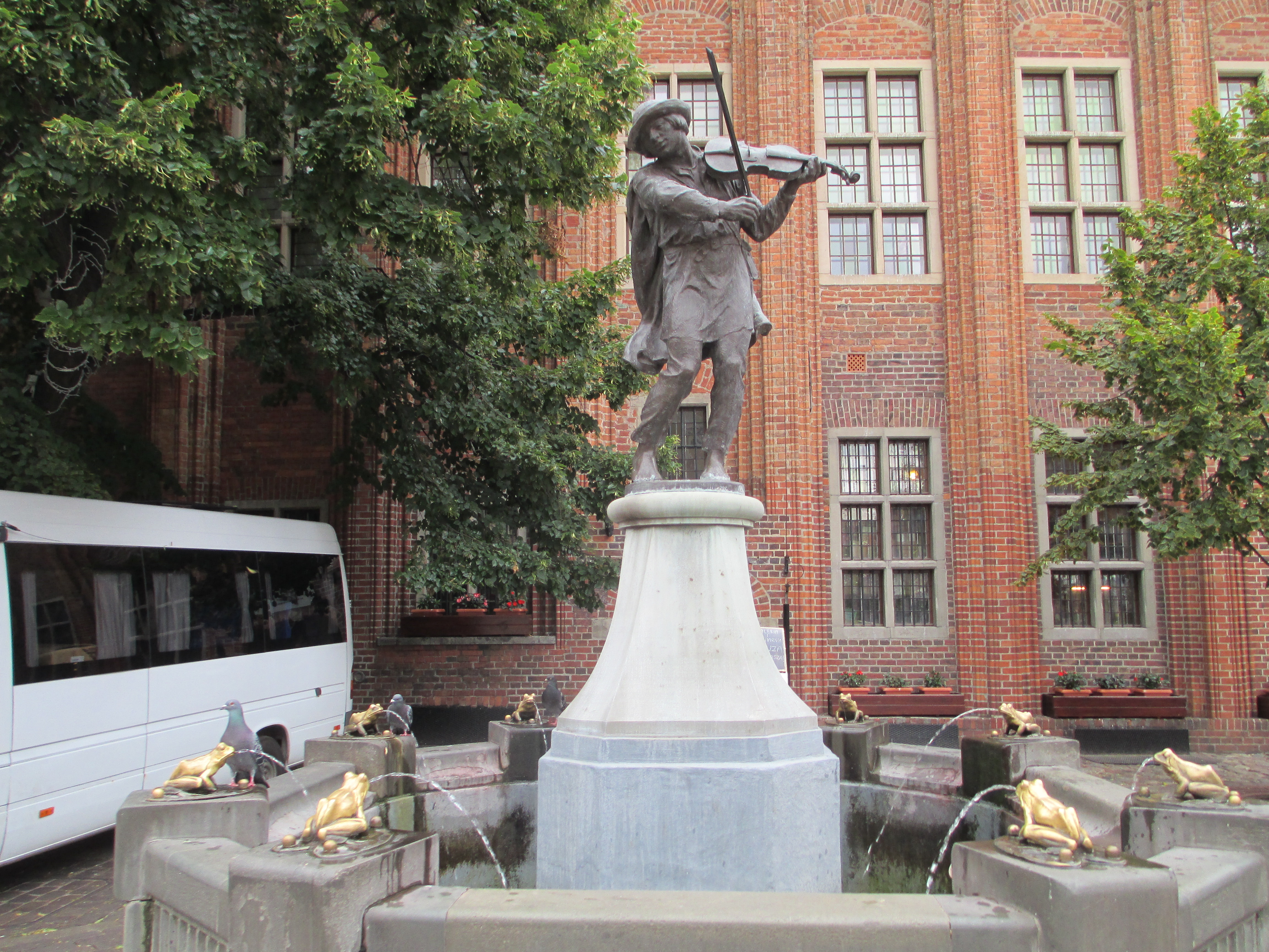 מזרקת השייט בטורון